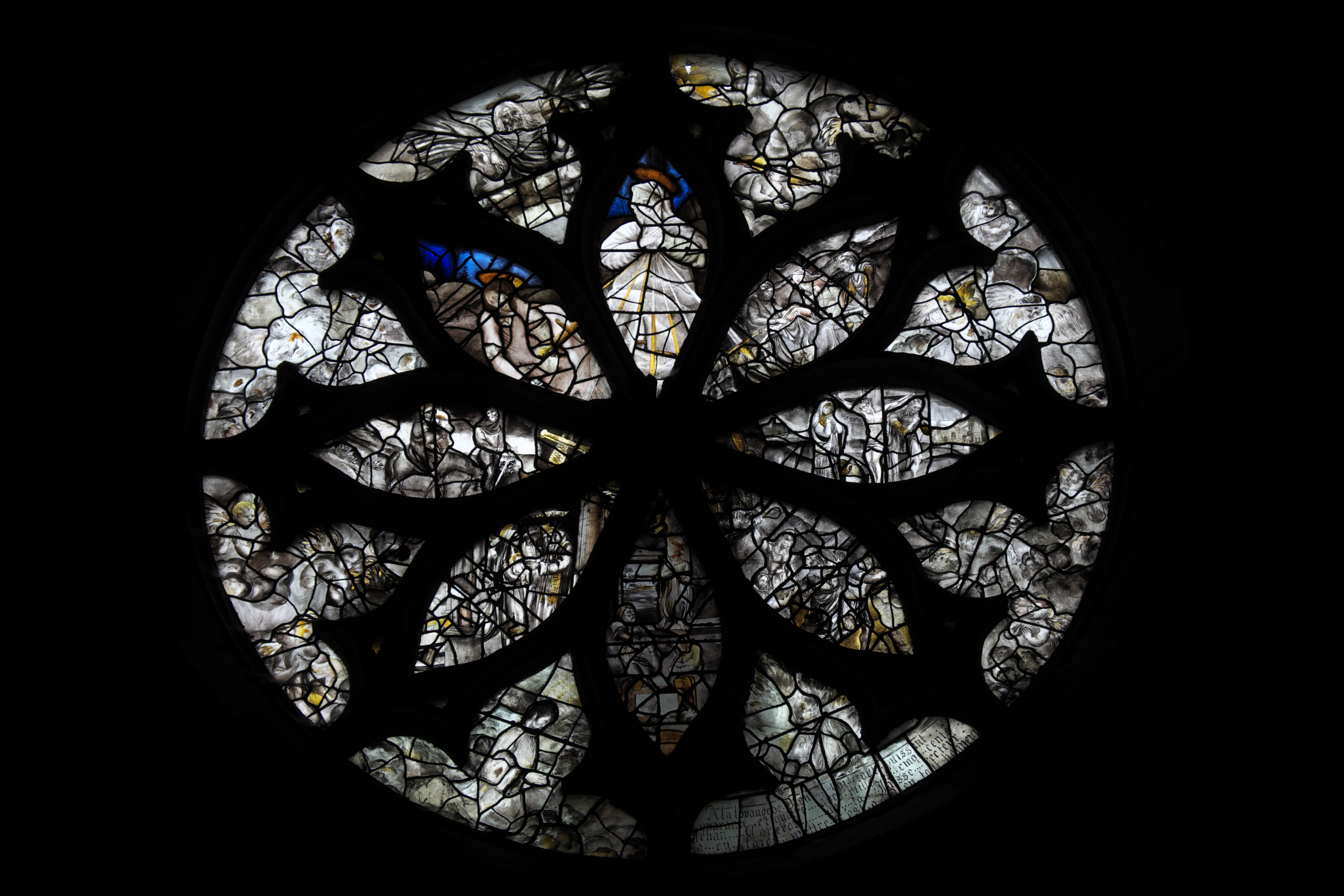 Kirche Saint-Jean-Baptiste in Chaource im Département Aube (Champagne-Ardenne/Frankreich), Bleiglasfenster mit Fragmenten aus der Renaissance, Rosette